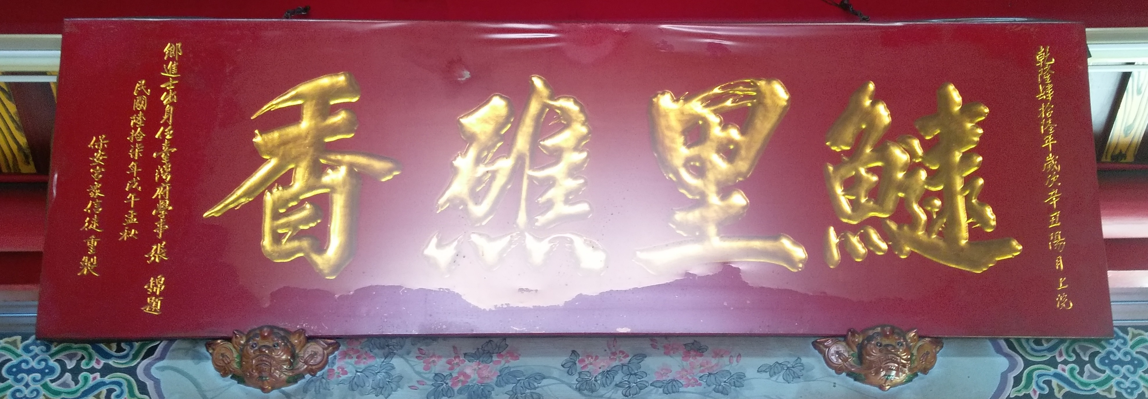 中文（台灣）: 大清乾隆十六年（公元1751年）由鄉進士出身任臺灣府學事-張錦 題字 ，民國67年（公元1978年）重製